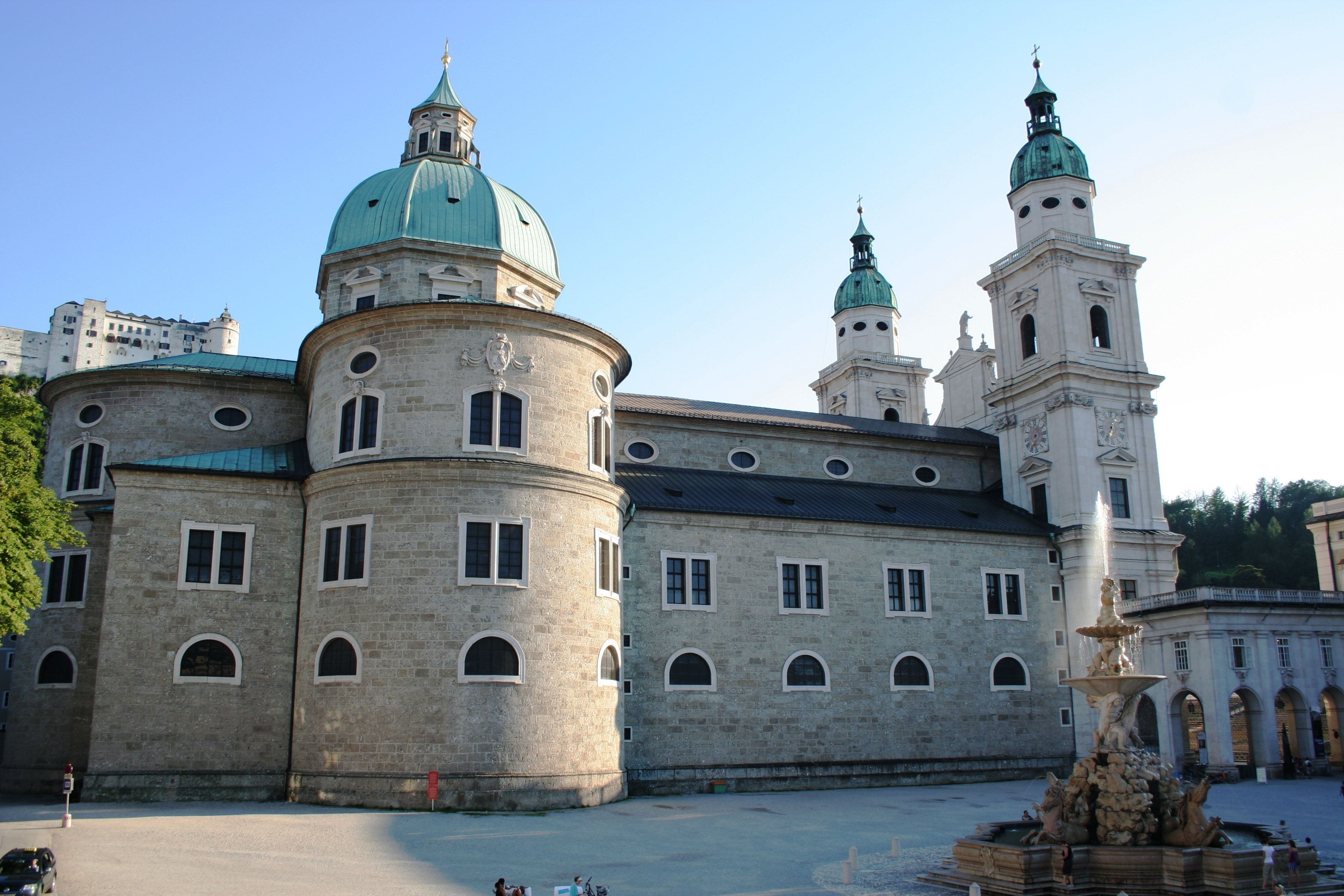 Dom, hll. Rupert und Virgil